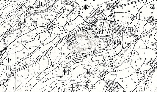 宮城県管内地図（昭和3年）。楕円形に見えるものは色麻村の競馬場です。